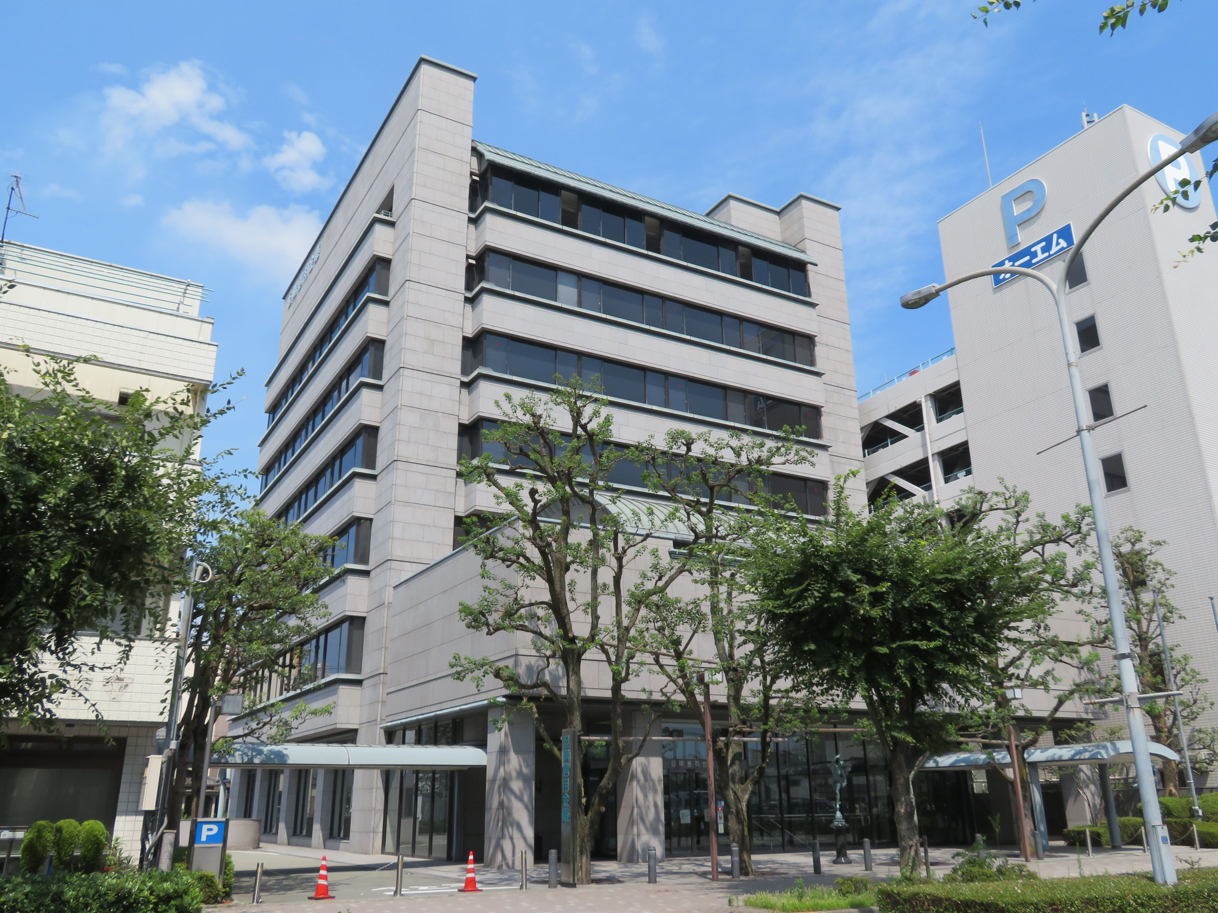 但陽信用金庫本店